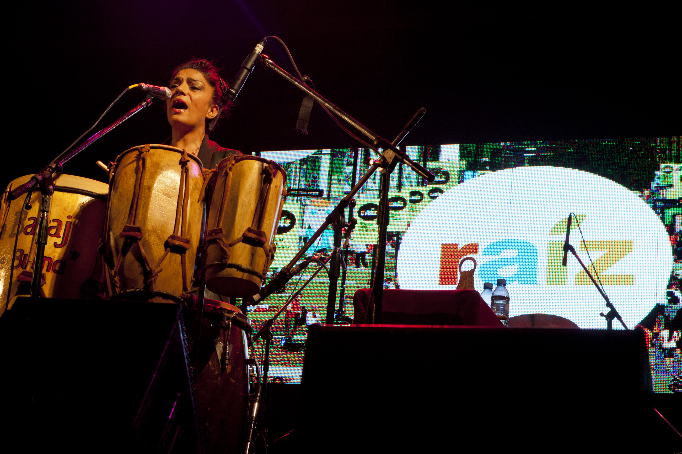 Villa Martelli, 2 de noviembre de 2014. Tercer día de "Raíz Festival Gastronómico" en Tecnópolis. Foto: Augusto Starita / Ministerio de Cultura de la Nación.